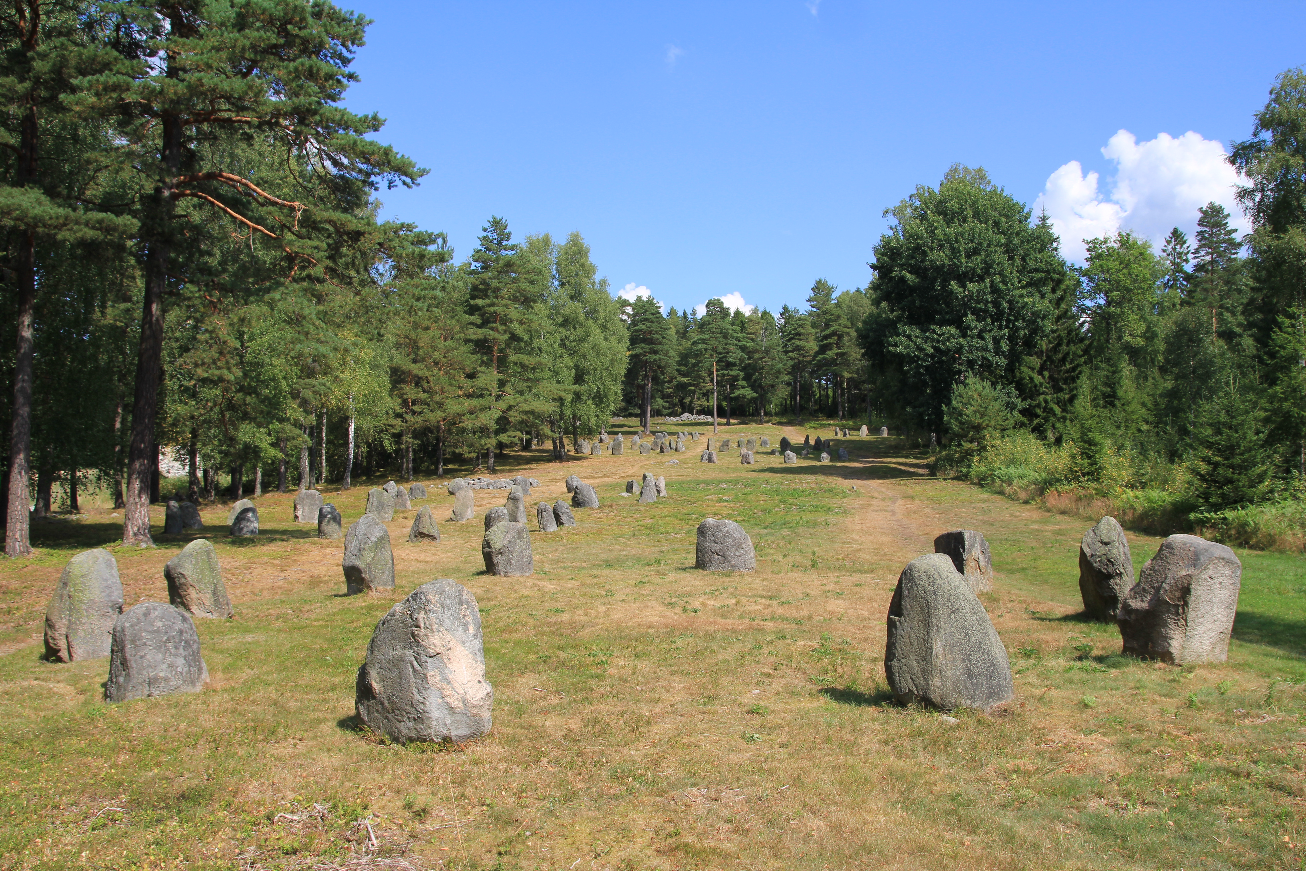 Gravfeltene ved Hunn